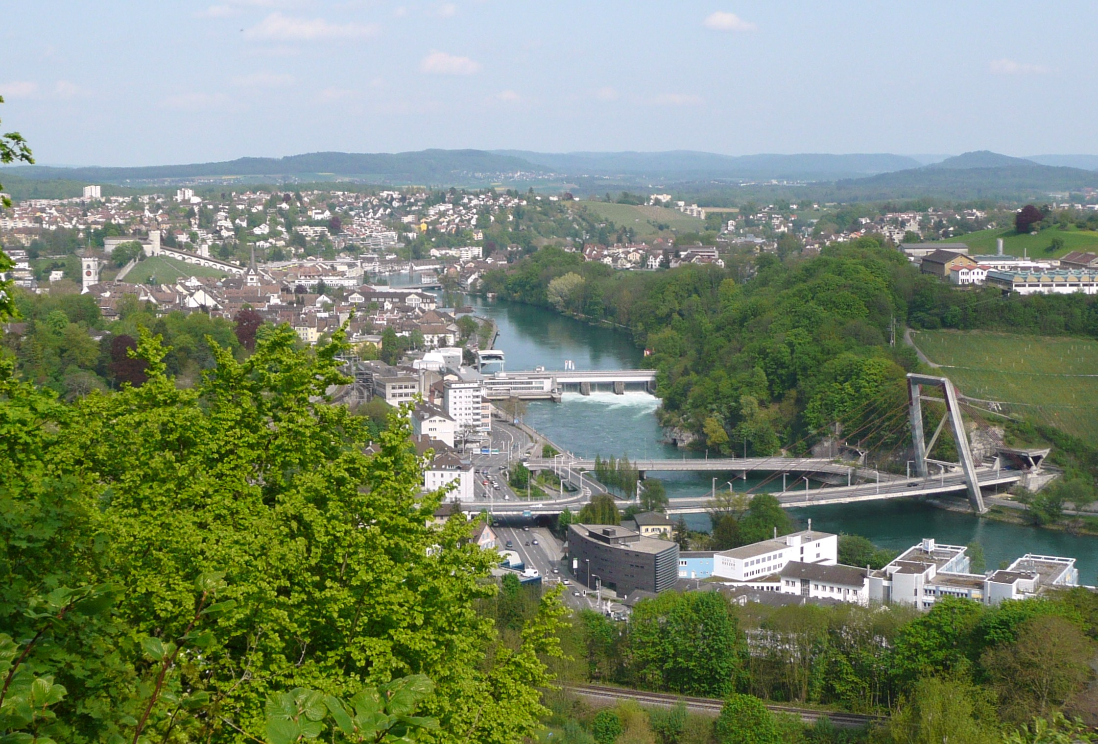 Blick von der Hohfluh auf die Stadt Schaffhausen und den Rhein mit der Festung Munot, dem Kraftwerk und der Schrägseilbrücke A4.